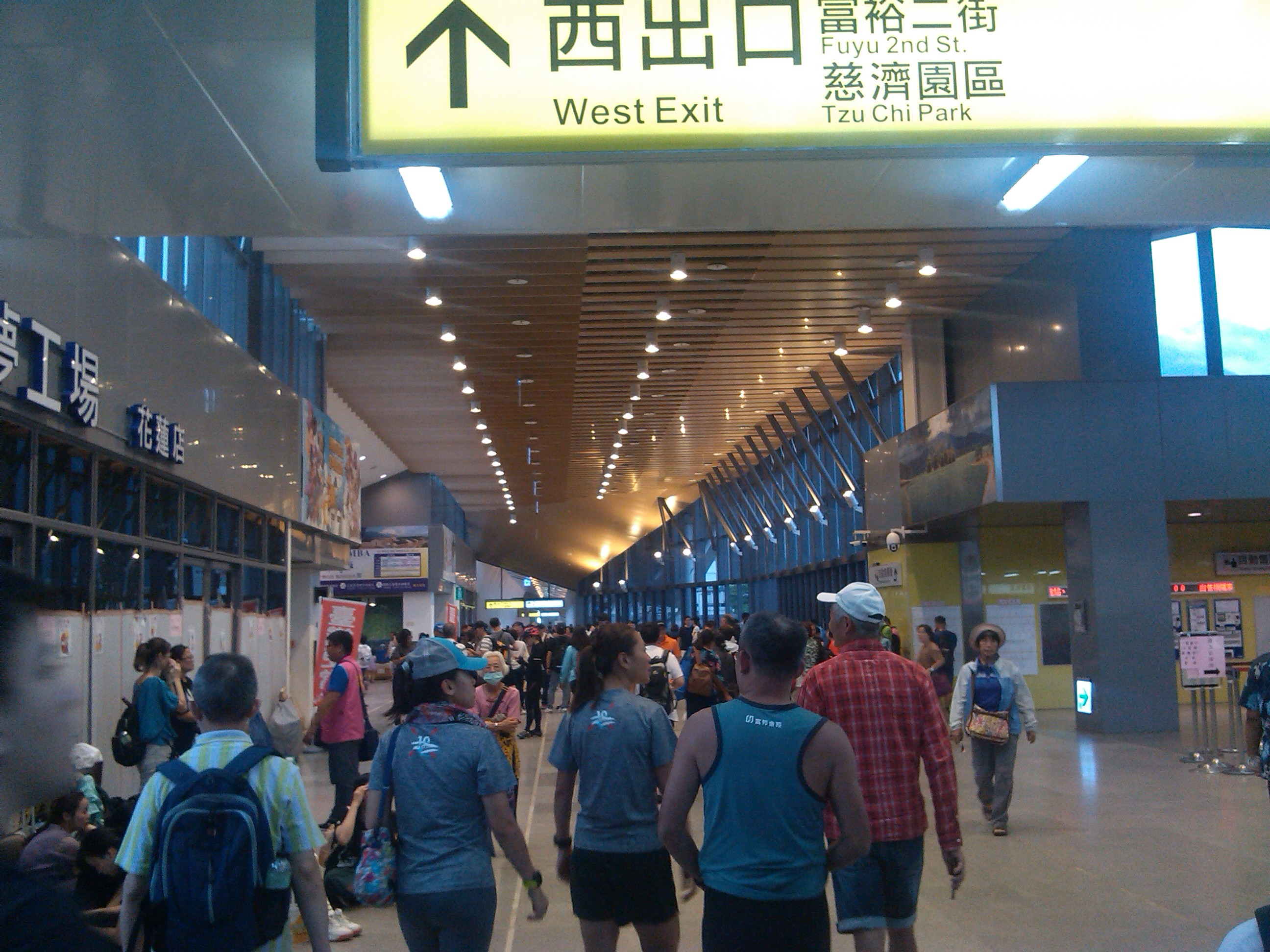 新落成的高架化售票口和大廳